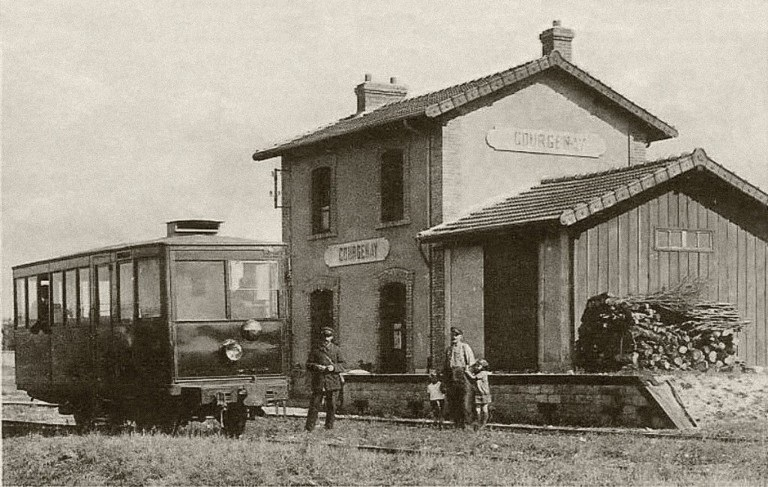 Meterspuriger benzinmechanischer Einrichtungs-Triebwagen Renault Typ NF aus dem Jahre 1925 der Chemins de Fer d'Intérêt Local de l'Yonne (CFY) im Bahnhof Courgenay